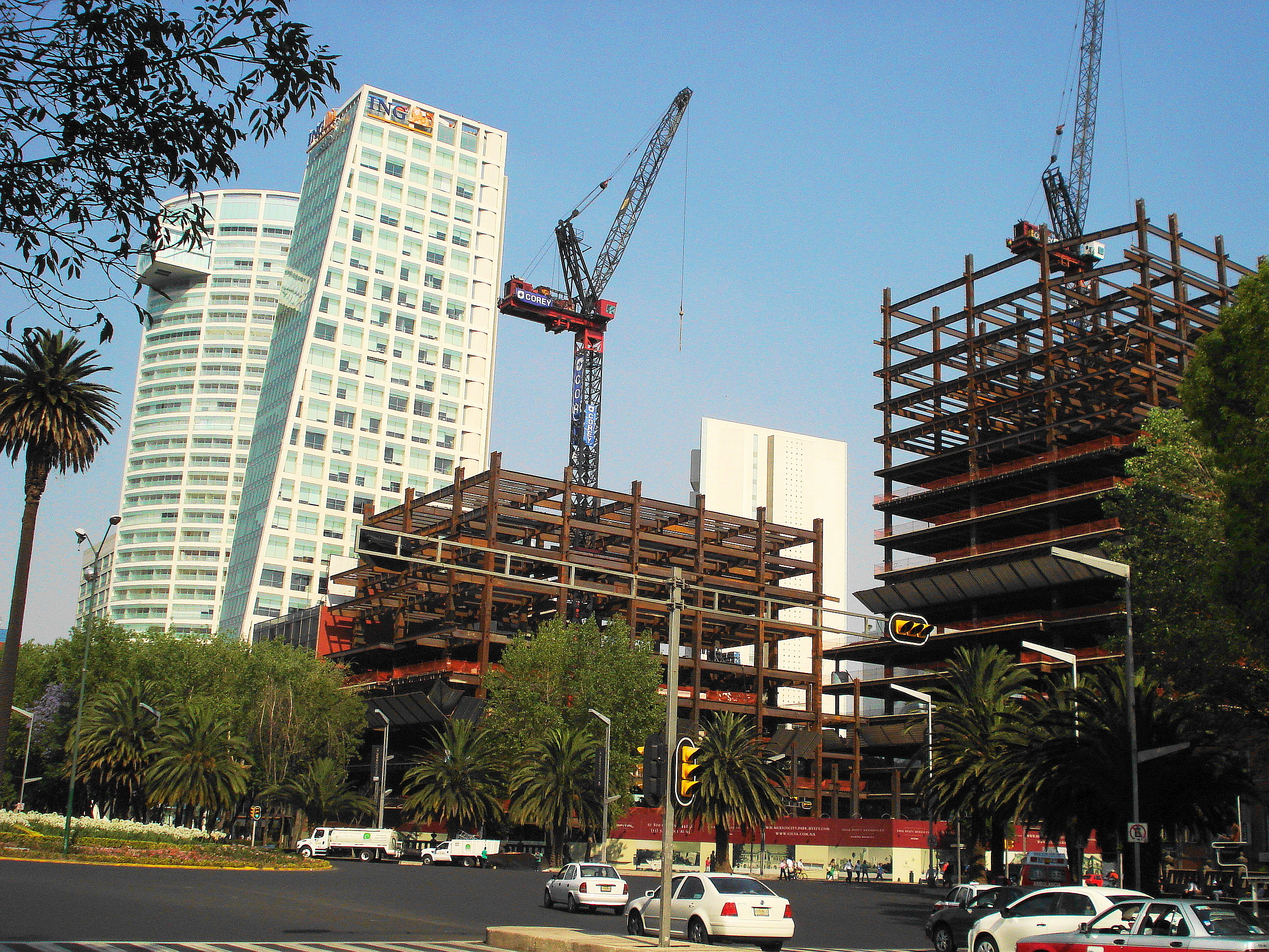 Edificios en construcción a lo largo del Paseo de la Reforma. El complejo de las tres torres de Reforma 222 y las dos torres de Capital Reforma (en construcción) en Paseo de la Reforma, Ciudad de México.